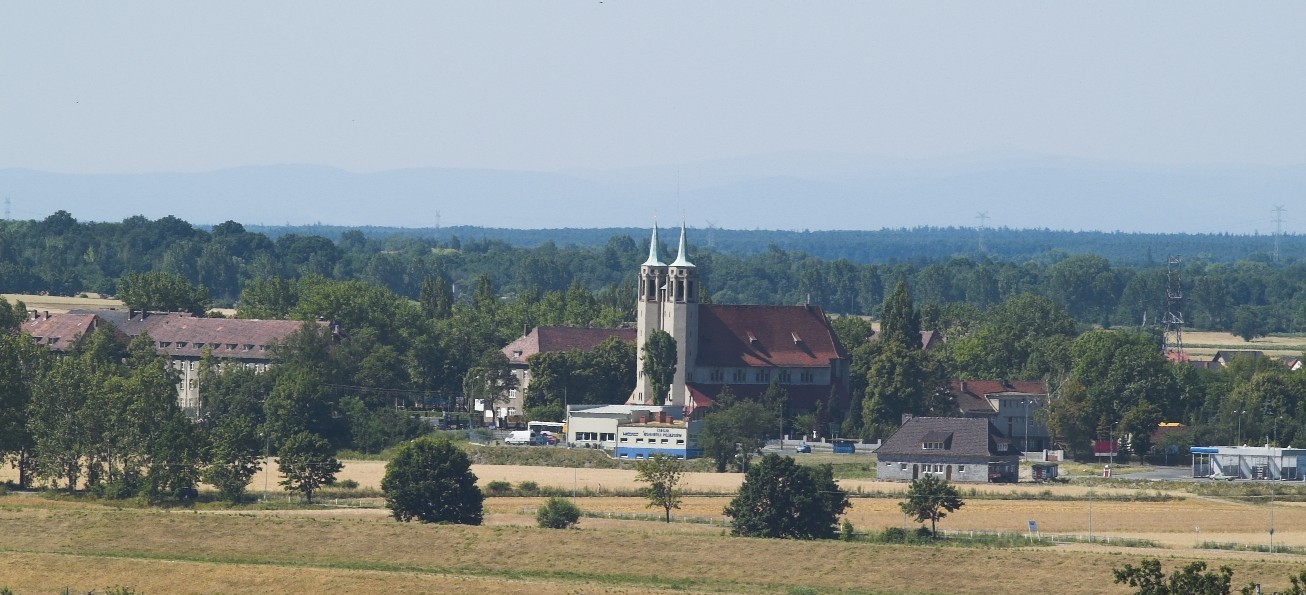 The church in Opole-Szczepanowice